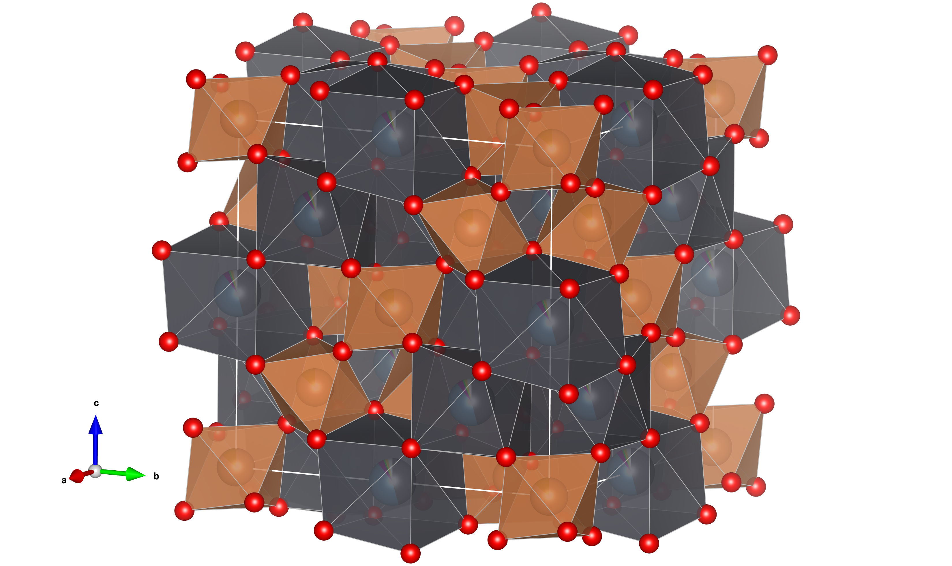 Kristallstuktur von Oxyplumboroméit als „Polyeder-Modell“. Erstellt mithilfe des freien Strukturprogramms VESTA und den CIF-Daten von Ulf Hålenius und Ferdinando Bosi Farblegende: BO6-Oktaeder: braun; AO8-Polyeder: grau; Sauerstoff: rot.